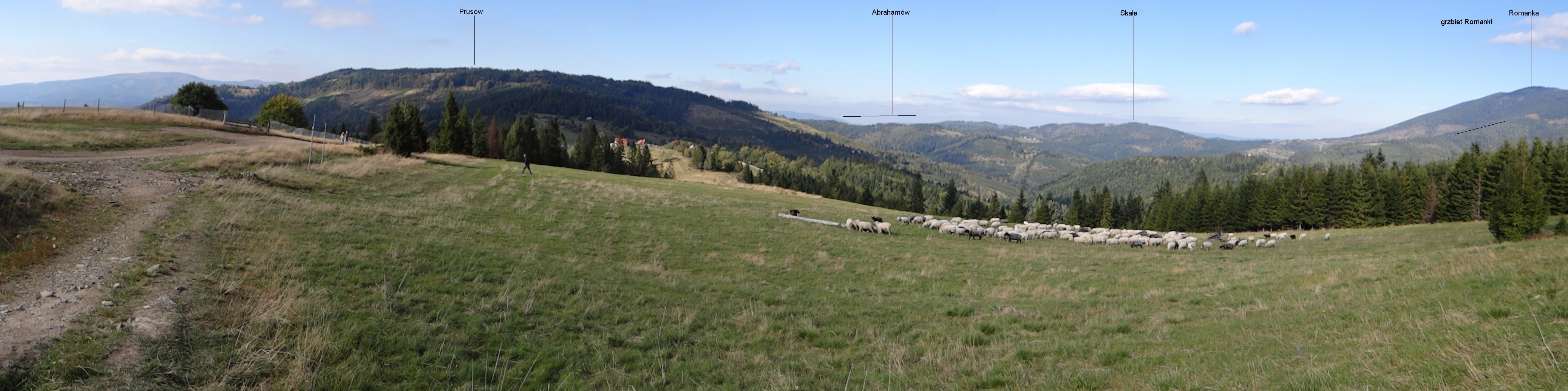 Widok z Hali Boraczej